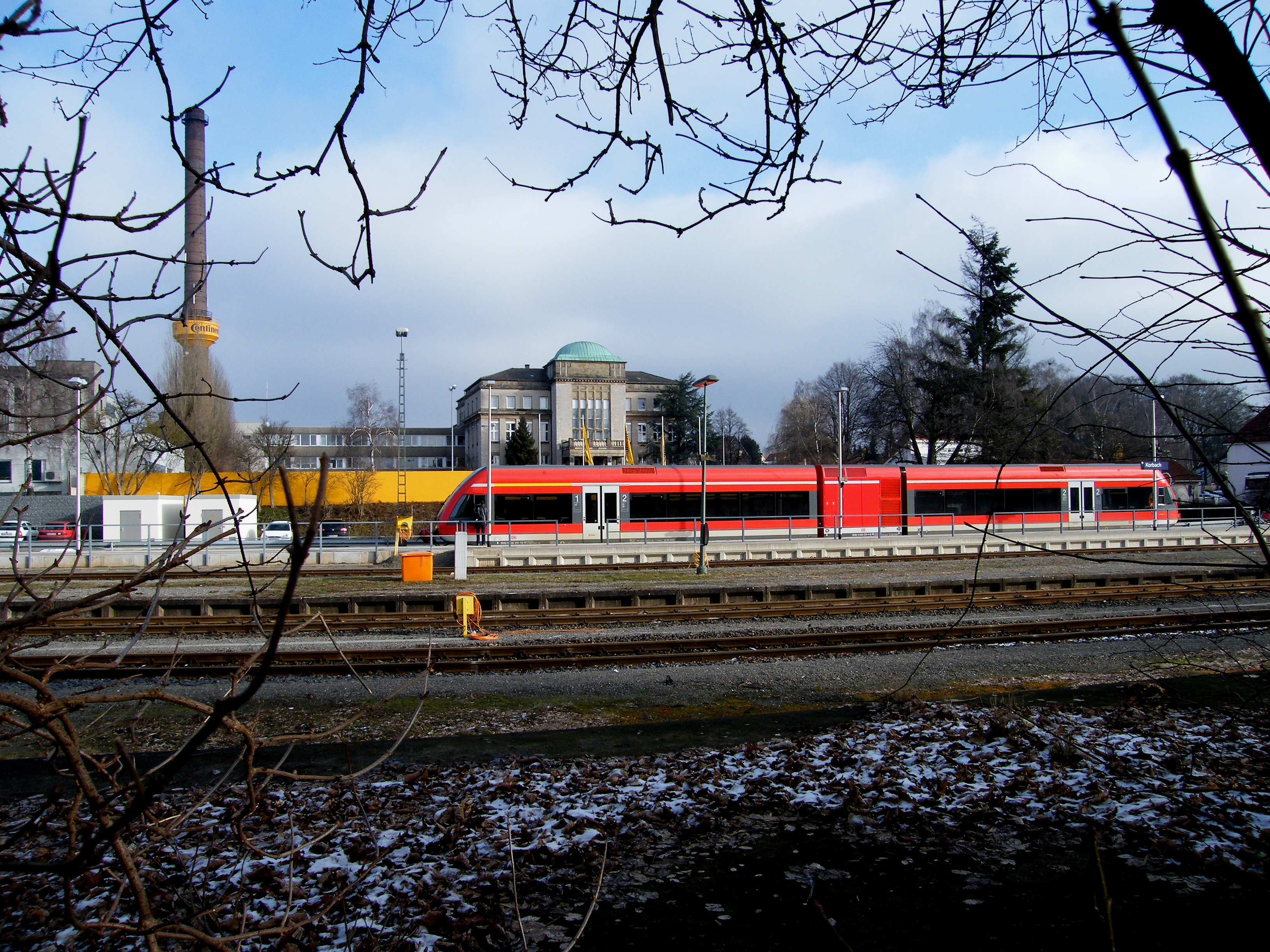 Bahnhof Korbach - Nahverkehrszug der Kurhessenbahn nach Kassel. Hintergrund Continental Werk Korbach.